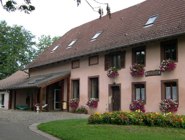 Village de Bethonvilliers (Territoire de Belfort), la mairie. Photo prise en juillet 2004 par LP90 Copyright : licence GFDL LP90 16 septembre 2004